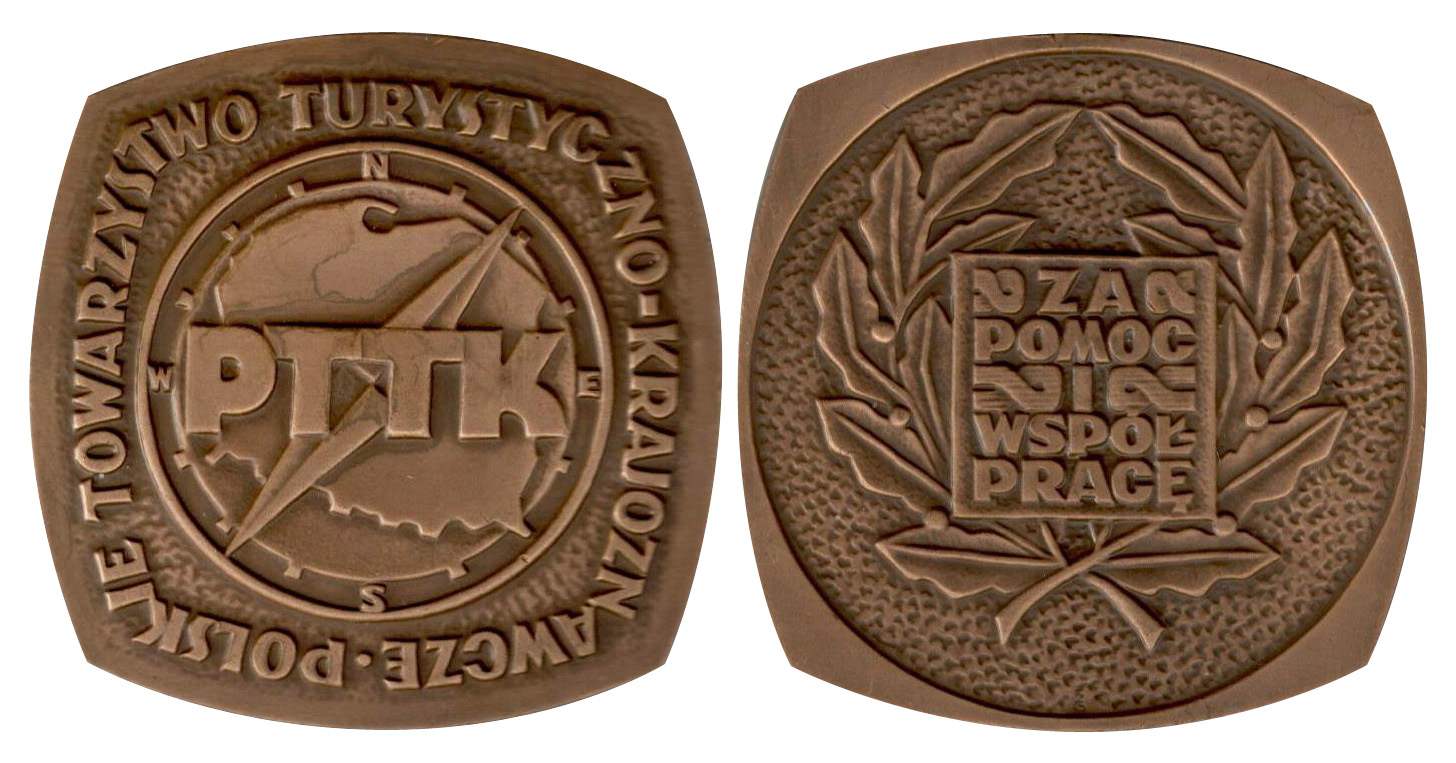 Zdjęcie awersu i rewersu Medalu PTTK "Za Pomoc i Współpracę".